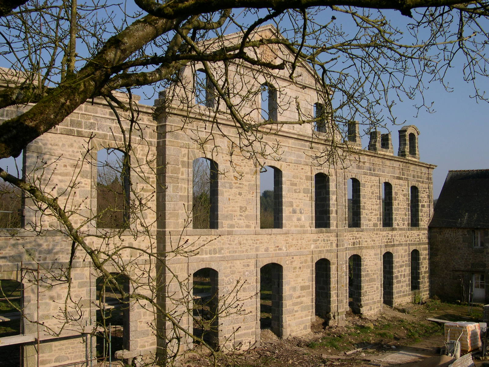 Abbaye de Koad Malouen à Kerpert (Côtes-d'Armor, France).